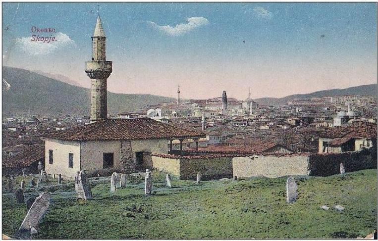 Tütünsüz Camii, Üsküp, Makedonya